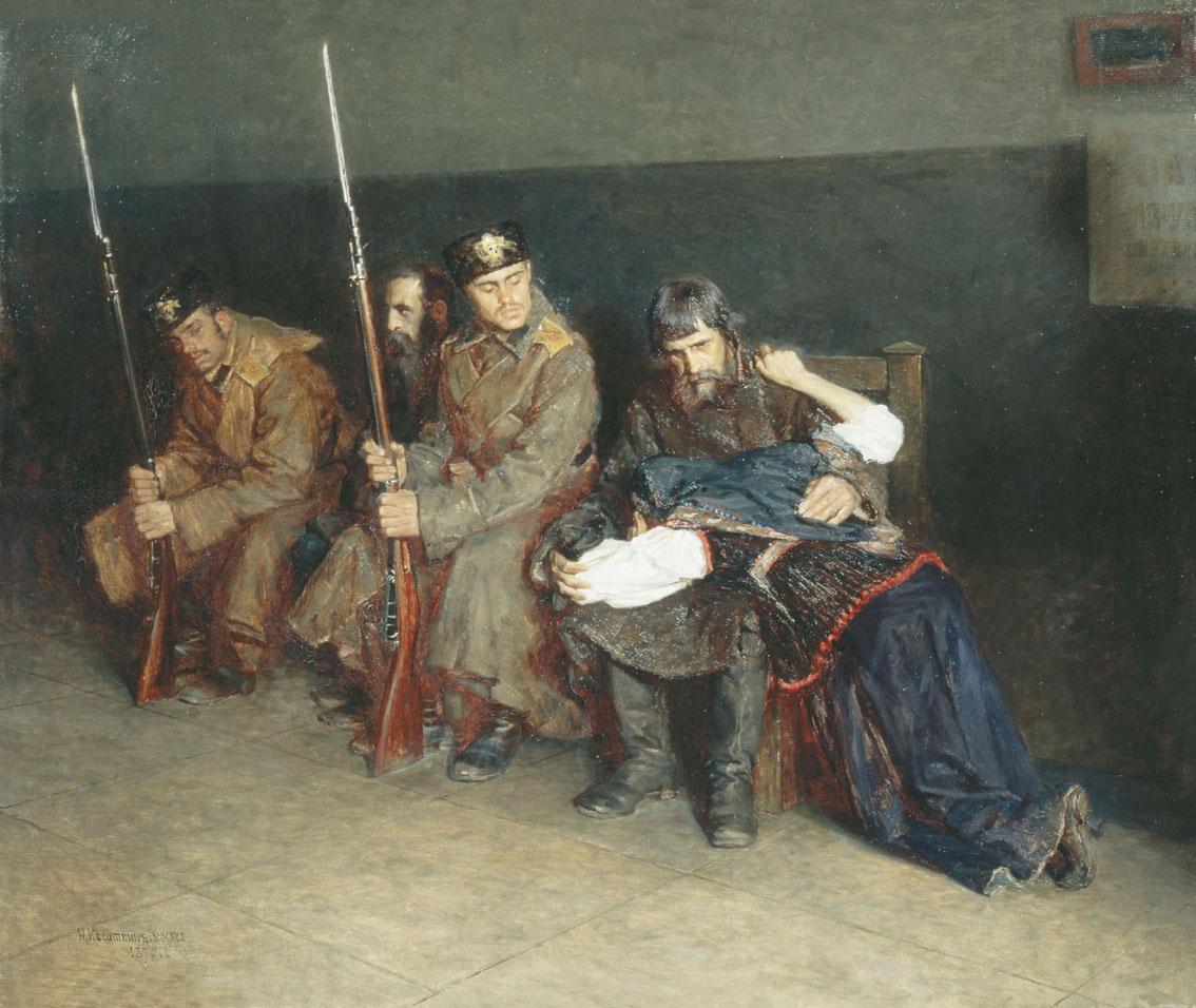 В коридоре окружного суда. 1897. Холст, масло. Севастопольский художественный музей им. П.М.Крошицкого, Севастополь